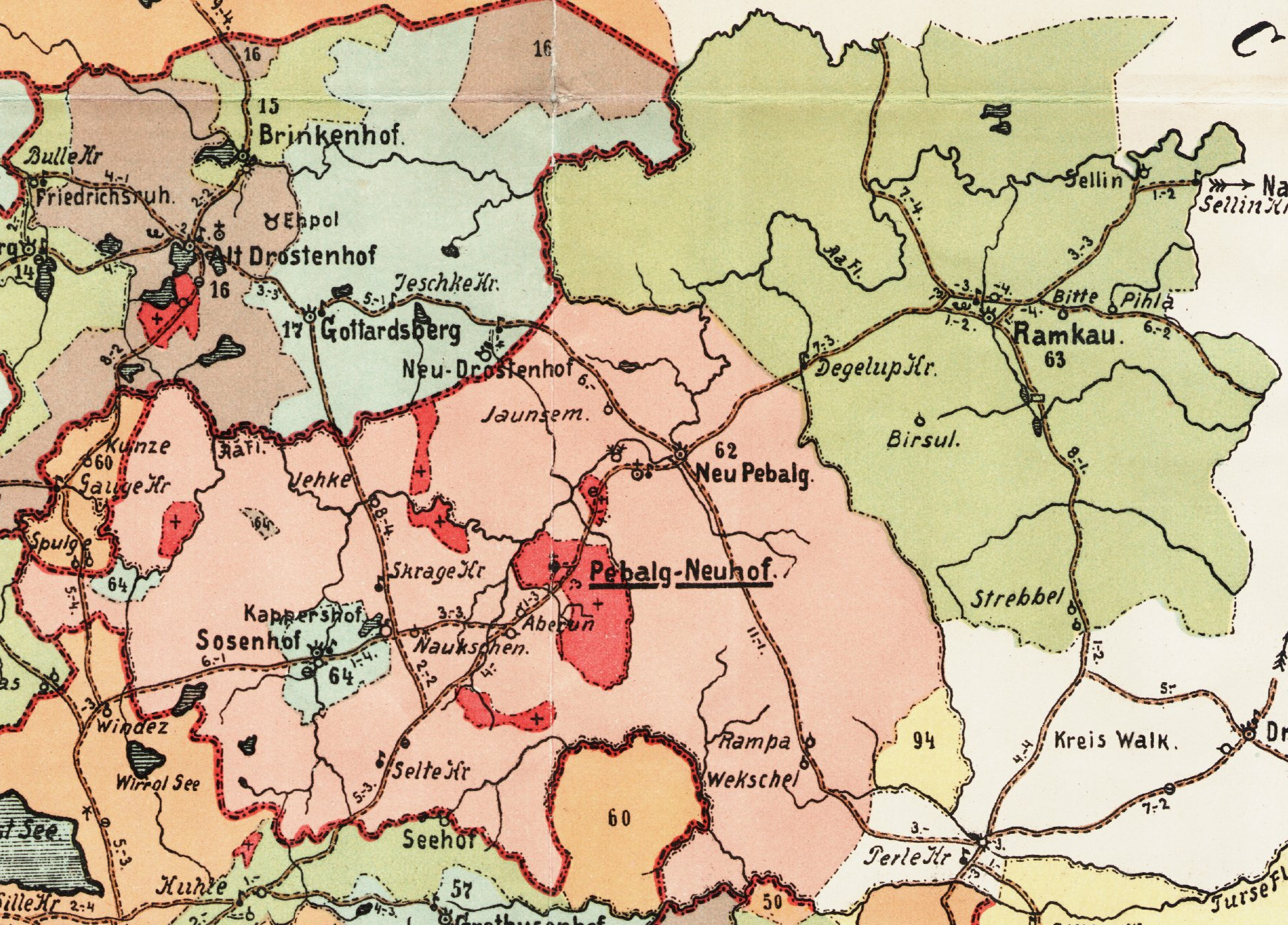 Jaunpiebalga kihelkonna mõisad 1903. aasta kaardil.